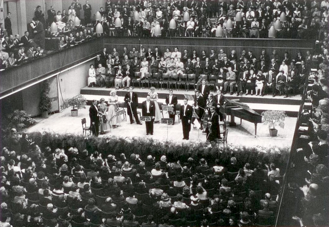 Historische Fotografie auf Papier eines unbekannten Fotografen anlässlich eines Konzertes der Festival Strings Lucerne 1956